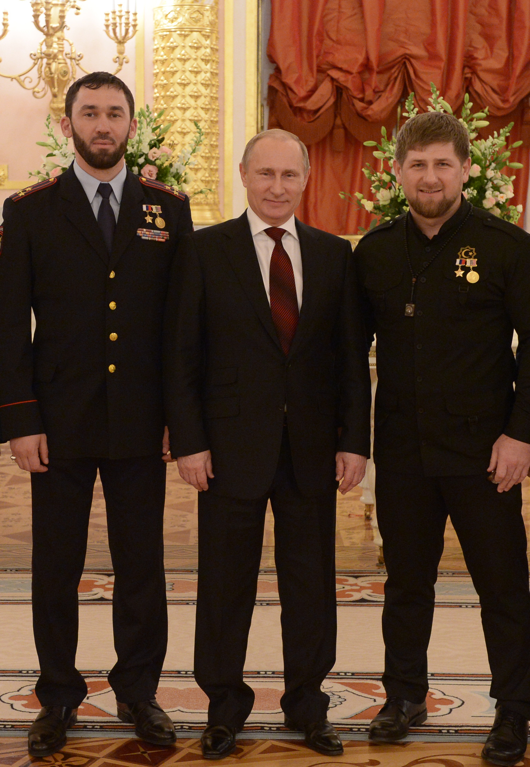 На торжественном мероприятии, посвящённом чествованию Героев страны. Москва, Кремль 2014 год This file, which was originally posted to was reviewed on 16 May 2017 by the administrator or reviewer Sealle, who confirmed that it was available there under the stated license on that date.